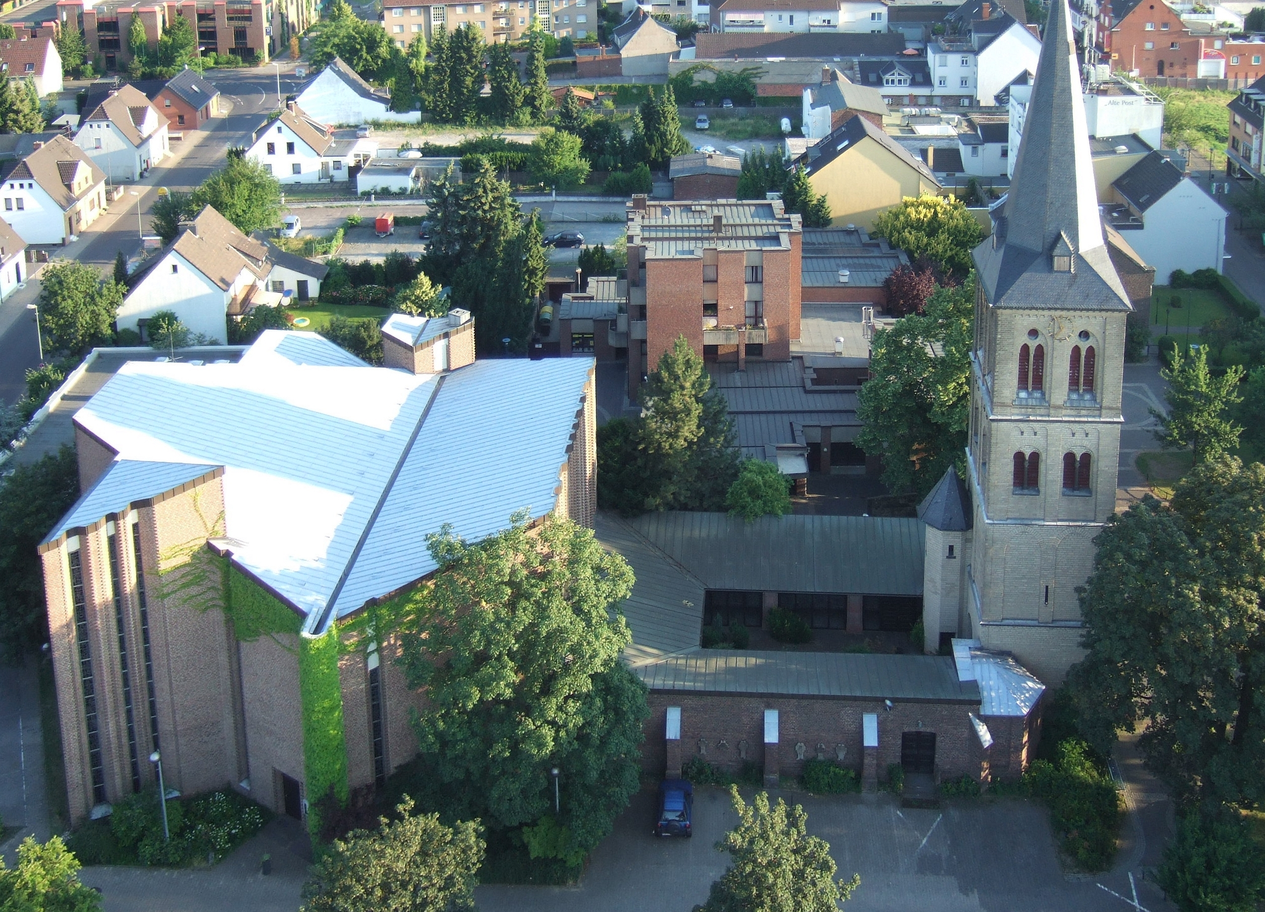 Kirche St. Michael in Dormagen (Deutschland) ; Church St. Michael in Dormagen (Germany)